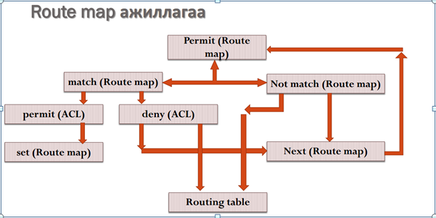 Монгол: зураг